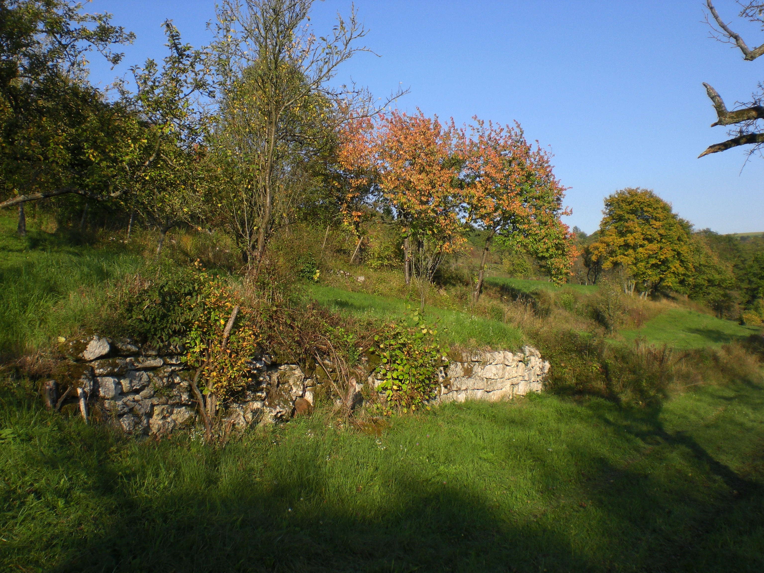 ehemaliger Weinberg an der Blies nahe Frauenberg